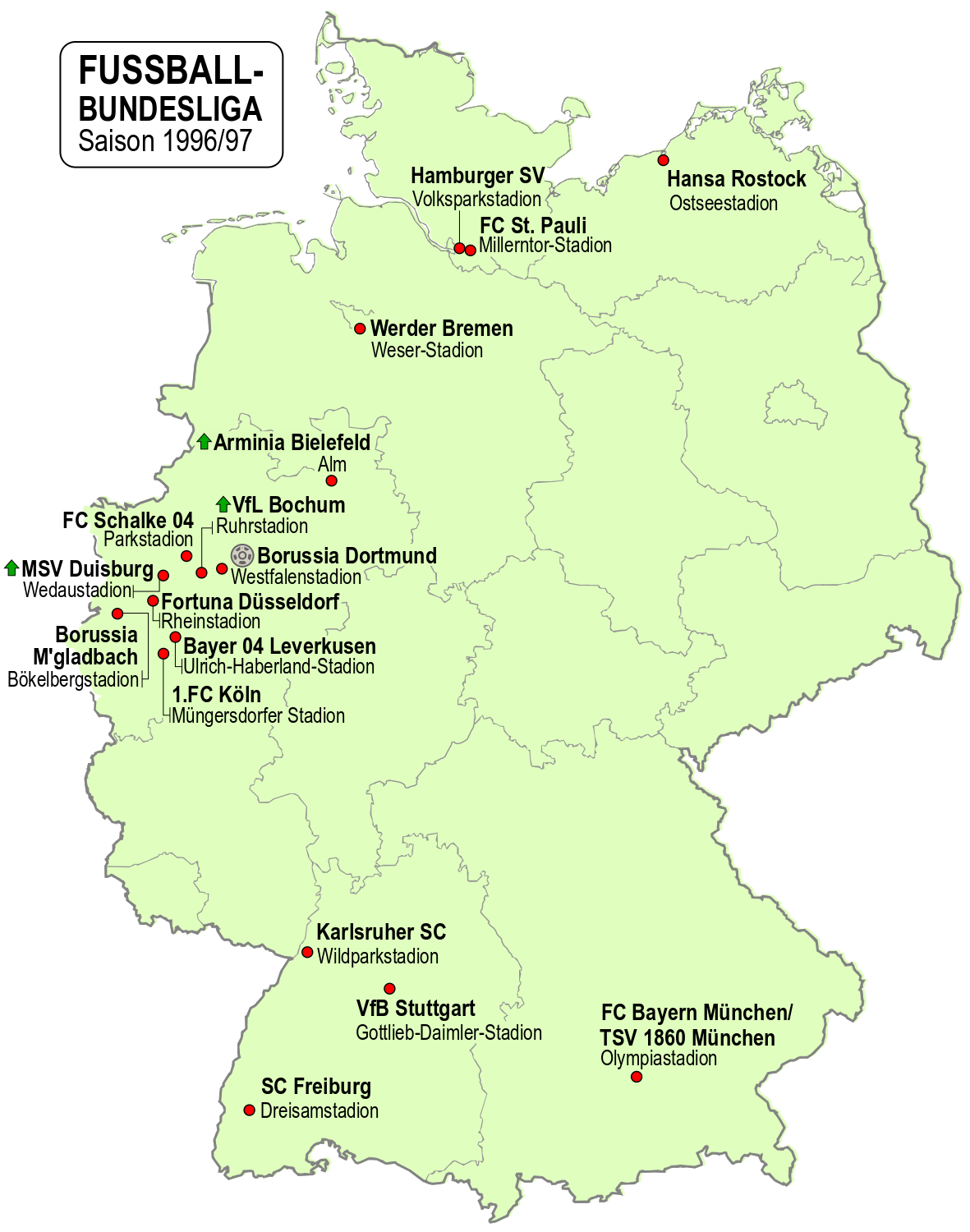 Karte der Vereine der Fussball-Bundesliga-Saison 1996/97